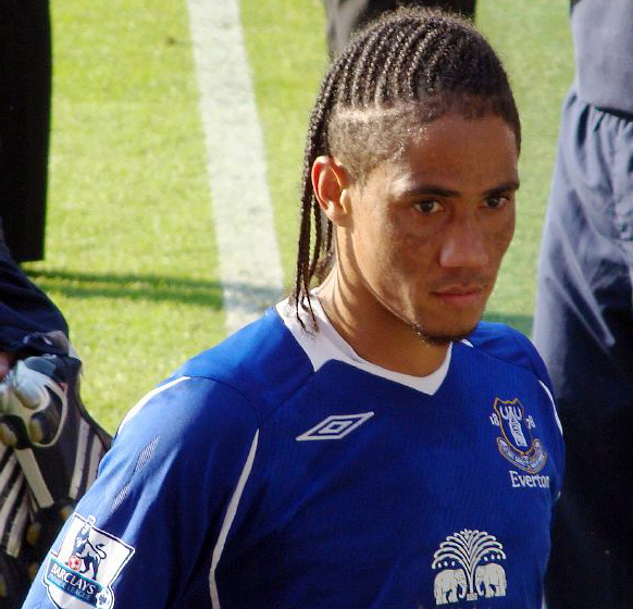 Steven Pienaar of Everton against Fulham